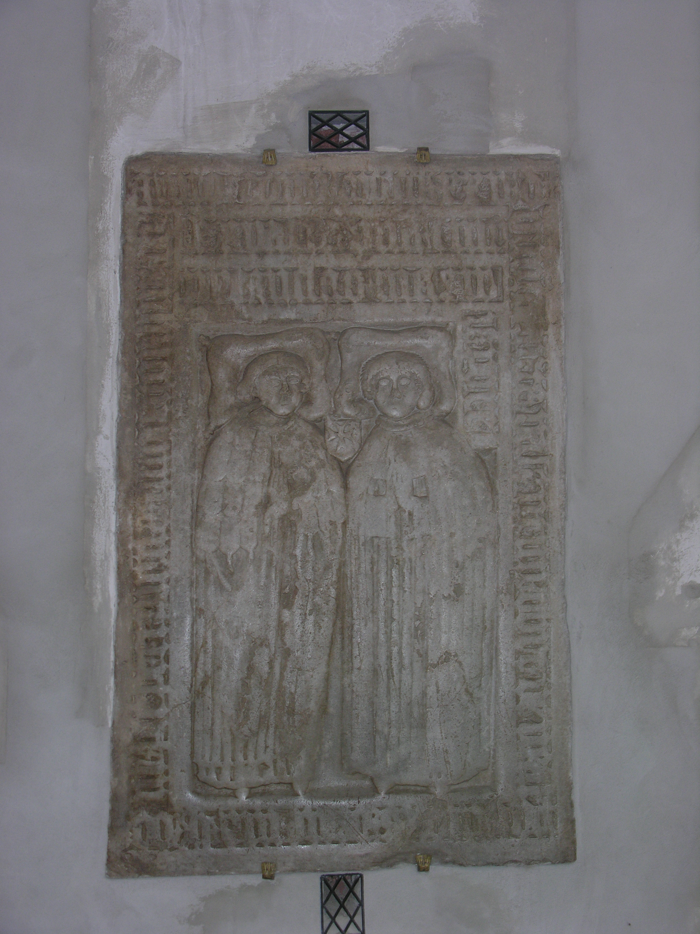 Nagrobek joannitów w kościele Boże Ciała we Wrocławiu, zapewne po 1432